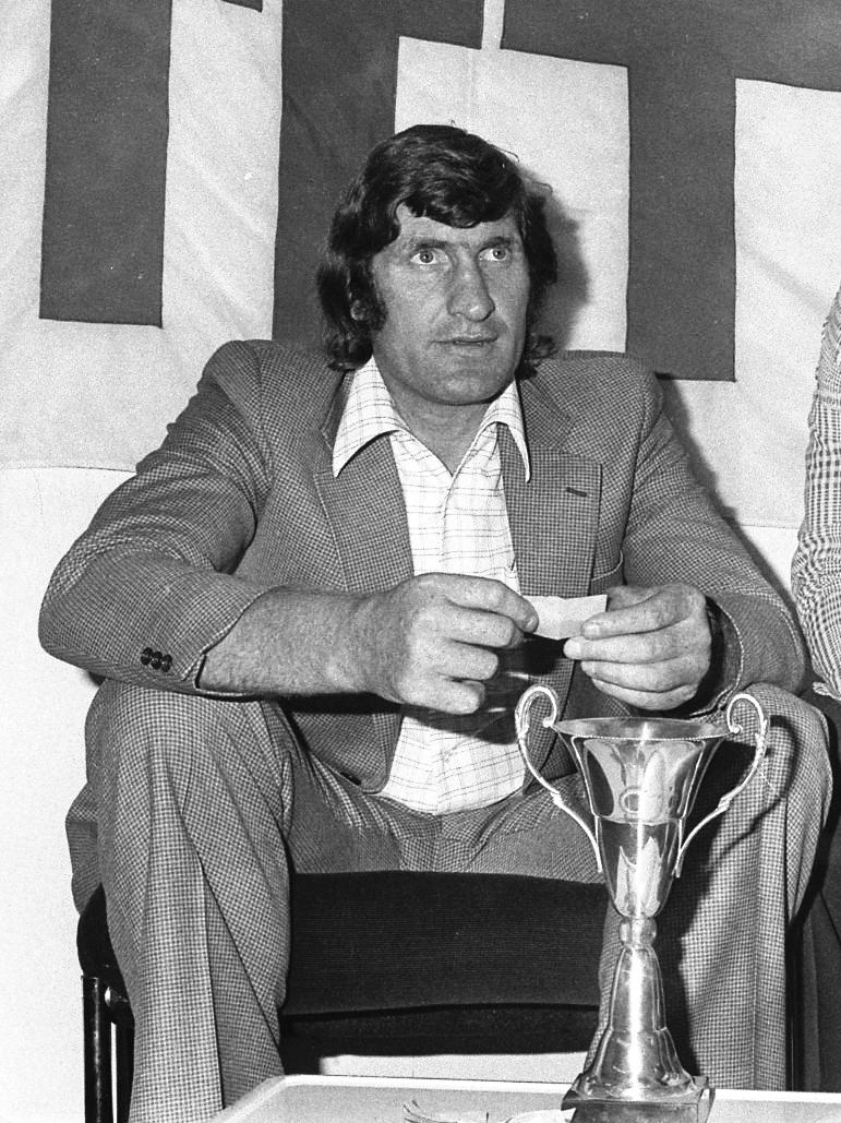 Pas de lieu. 14 Septembre 1978. Vue du tirage au sort avec messieurs Walter Spanghero, Bîmes et Dortmann.